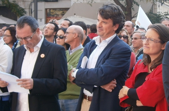 Joan Baldoví, Roger Mira i Mònica Oltra, de Compromís